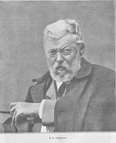 Кирилл Антонович Горбунов (1822—1893) — русский художник, литограф, академик Императорской Академии художеств.